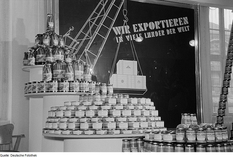 Original image description from the Deutsche Fotothek Lebensmittel in Dosen und Gläsern des VEB Halberstädter Fleischwaren auf der Leipziger Herbstmesse 1954